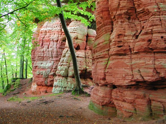 Altschloss de Roppeviller